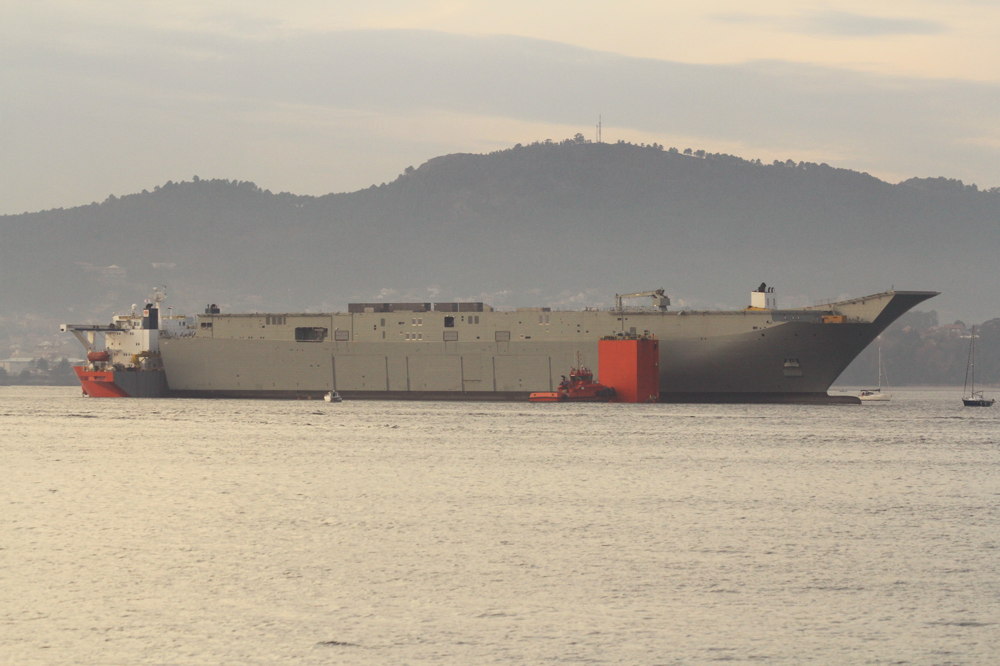 Embarque del portaaviones HMAS Adelaide de la Real Armada Australiana en la plataforma semisumergible Blue Marlin. El portaaviones fue construido por los astilleros de Navantia en Ferrol y la operación de embarque se lleva a cabo en la Ría de Vigo. Una vez cargado, el portaaviones será trasladado a Australia para completar su construcción. Vigo: Boarding of the aircraft carrier HMAS Adelaide at Blue Marlin platform Boarding of the aircraft carrier HMAS Adelaide of the Royal Australian Navy in the Blue Marlin semi-submersible platform. The aircraft carrier was built by Navantia shipyard in Ferrol and boarding operation is carried out in the Vigo Estuary. Once loaded, the aircraft carrier will be moved to Australia to complete its construction.